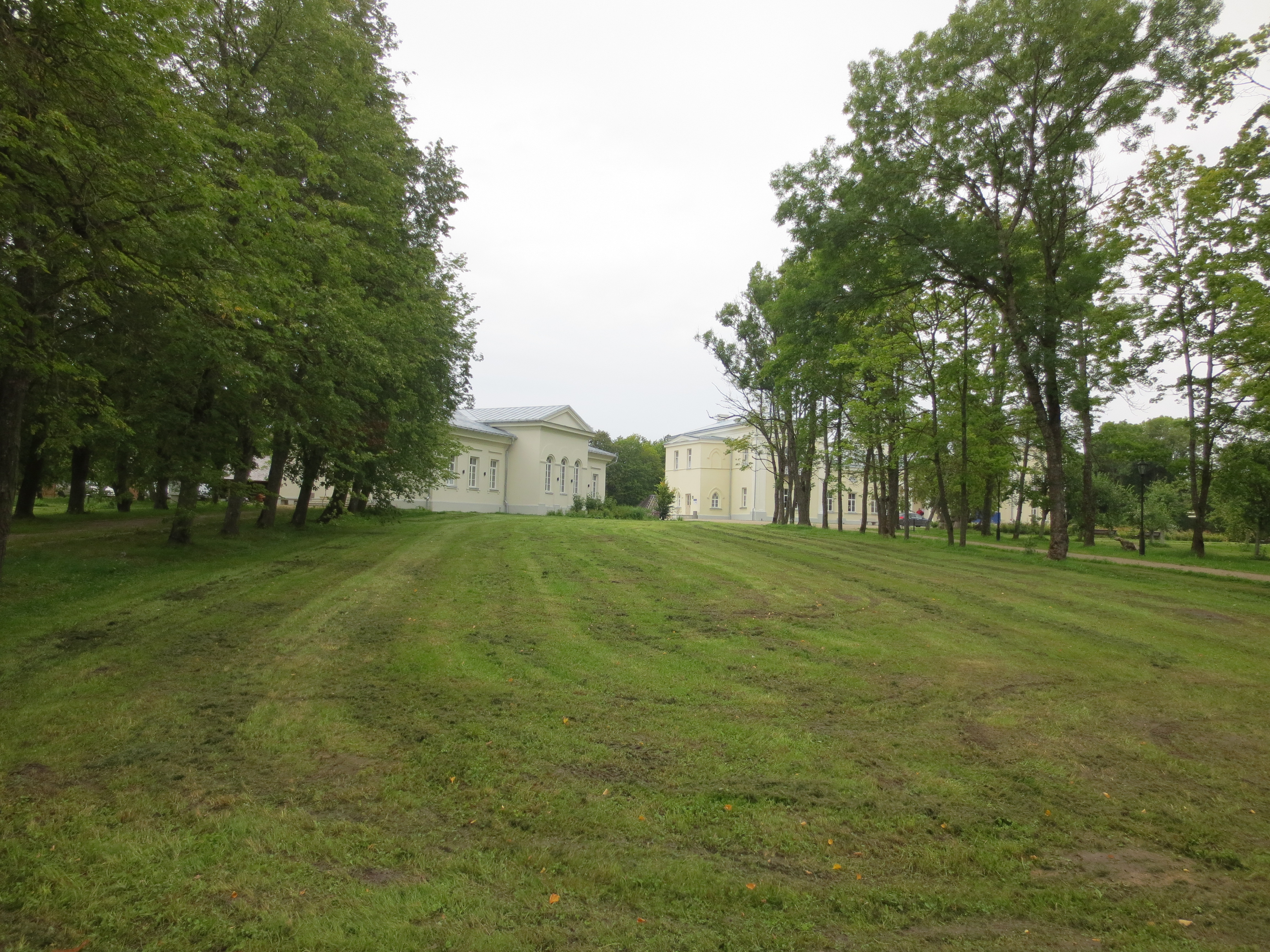 Burbiškis, Lithuania